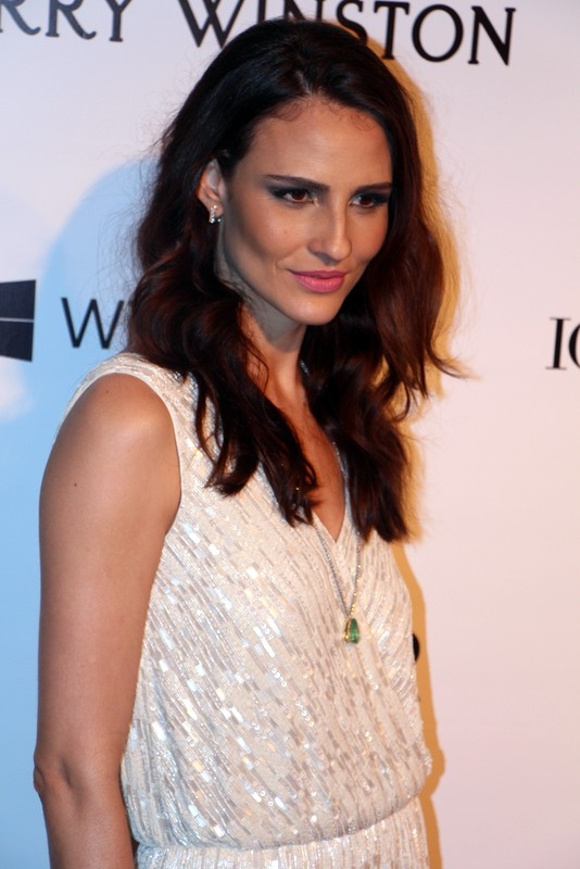 31 - Fernanda Tavares-001